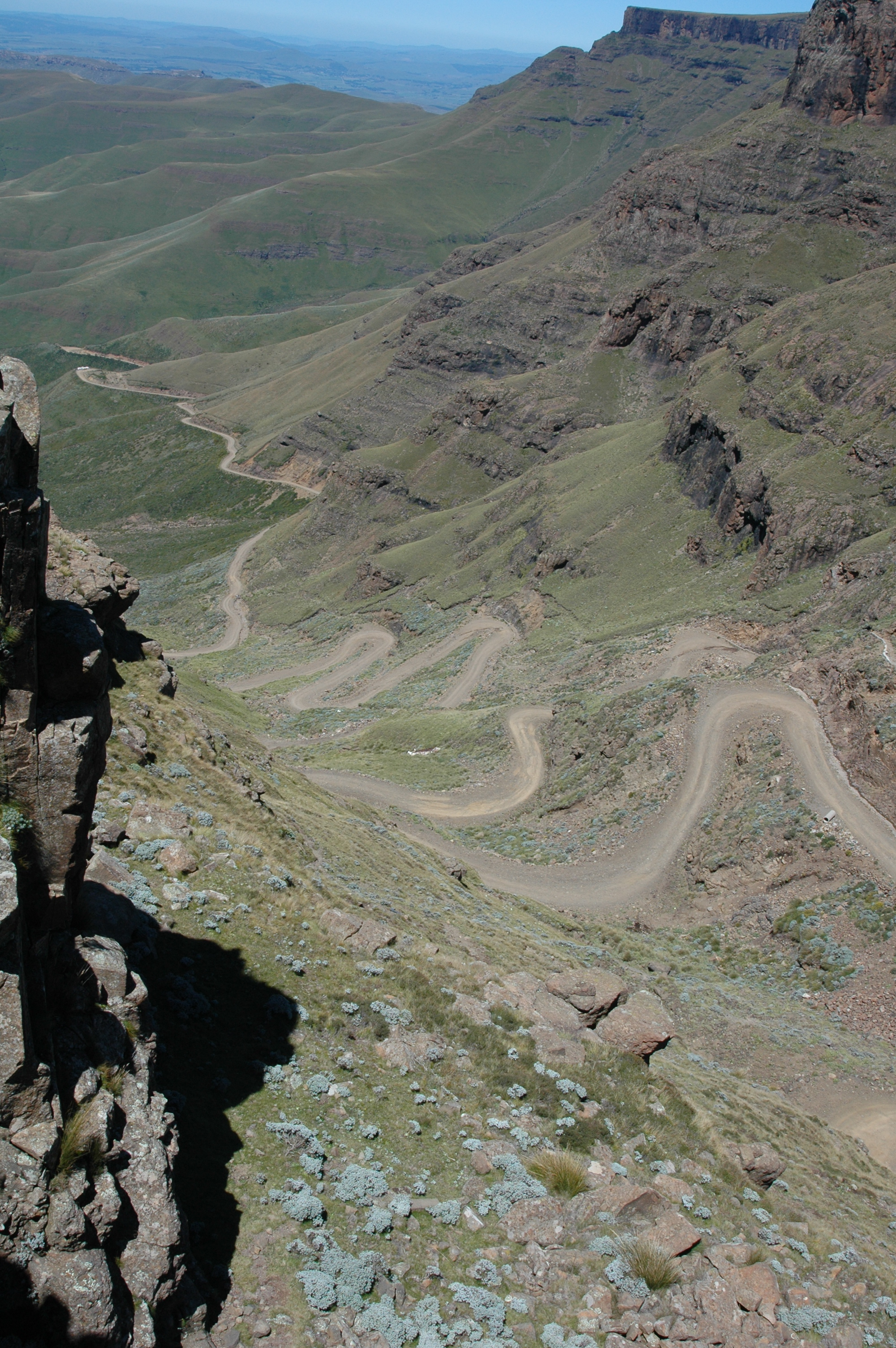 Sani Pass